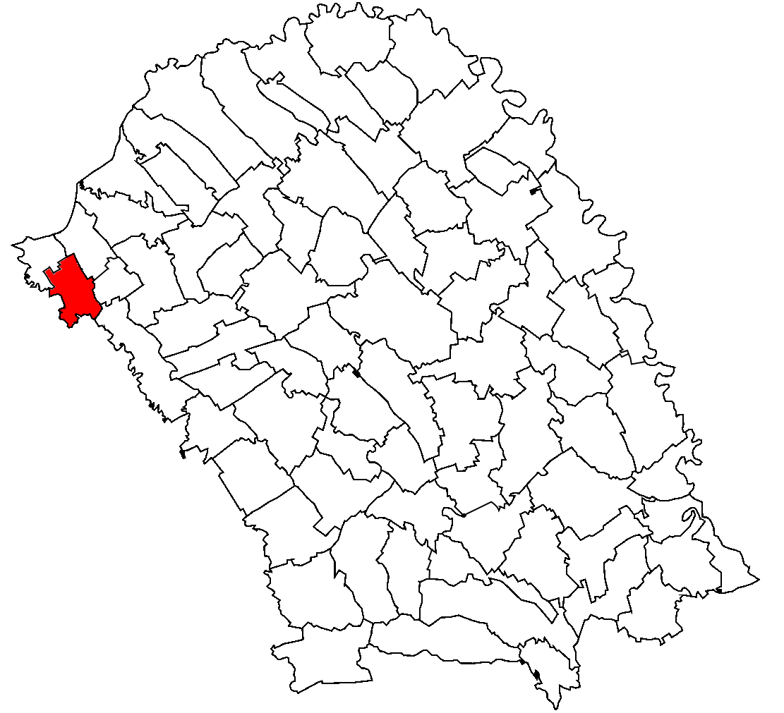 Categorie:Hărţi ale judeţului Botoşani